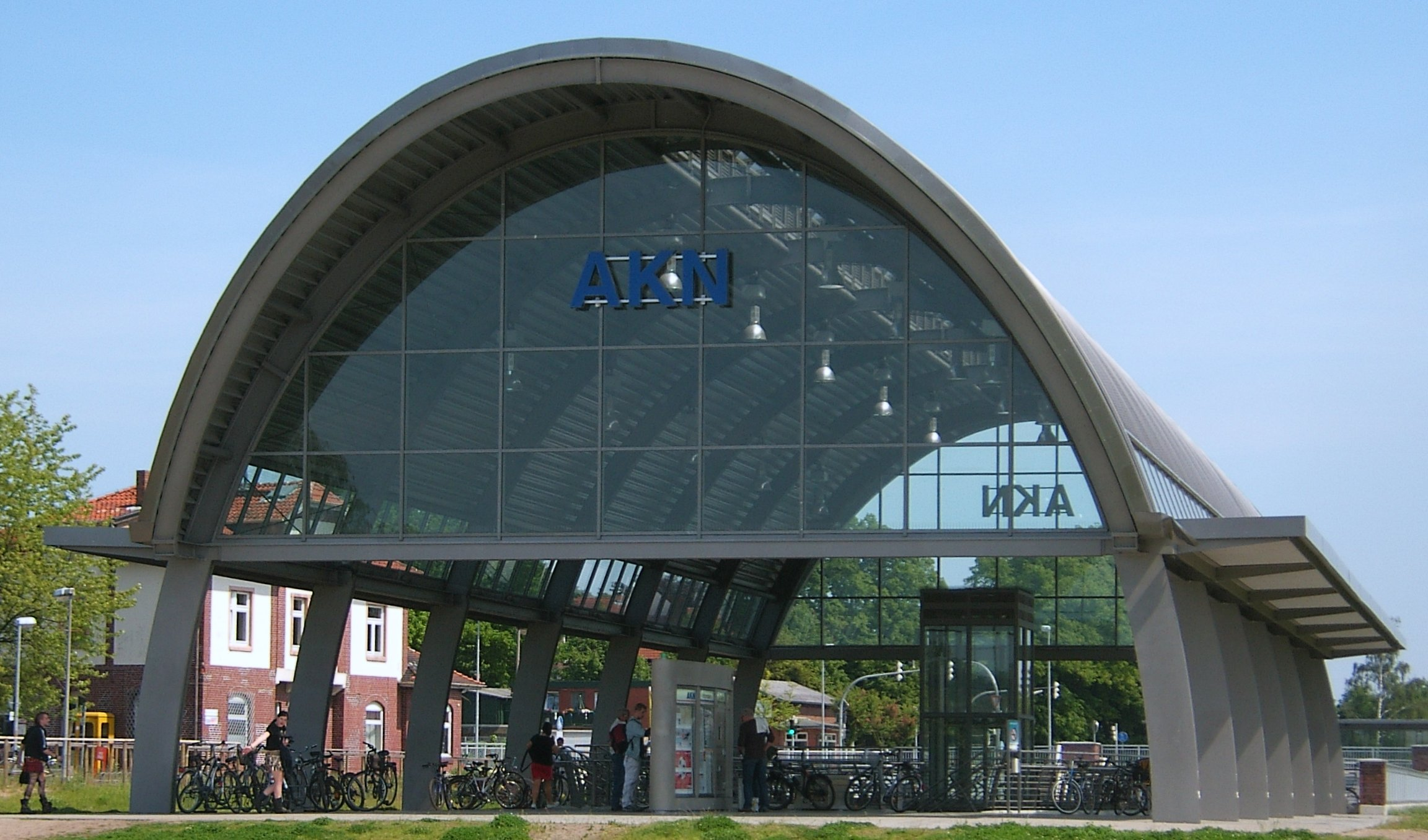 Der neue Bahnhof in Kaltenkirchen. Links hinten ist das alte Bahnhofsgebäude zu sehen.